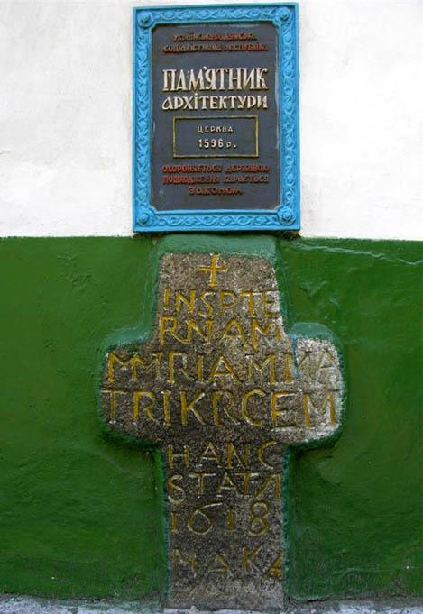 Хрест_і_таблиця_на_Миколаївській_церкві_в_Олевську.jpg: Свято-Миколаївська церква у центрі міста Олевська (райцентр Житомирської області), серпень 2005 року